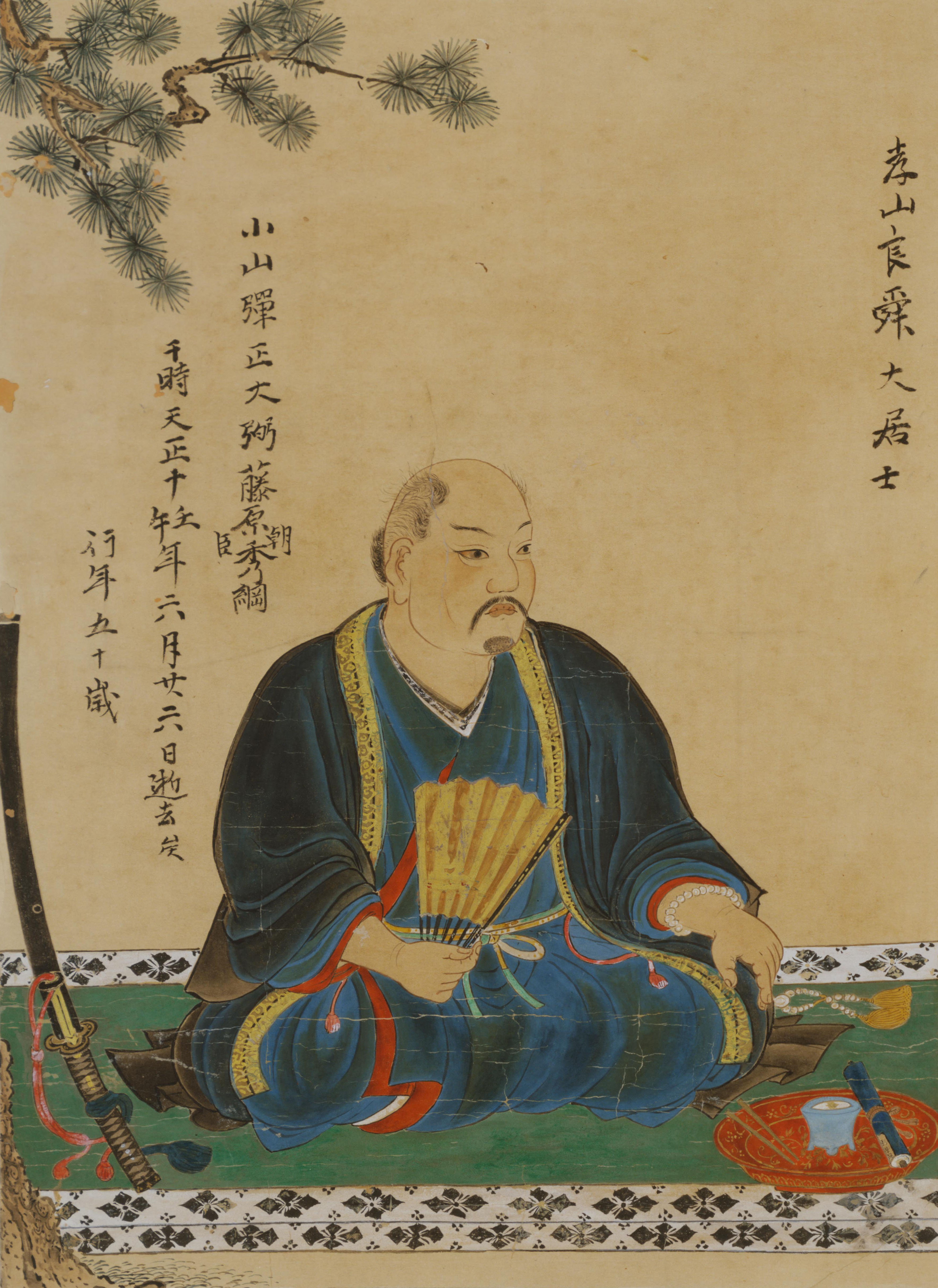 小山秀綱の肖像。